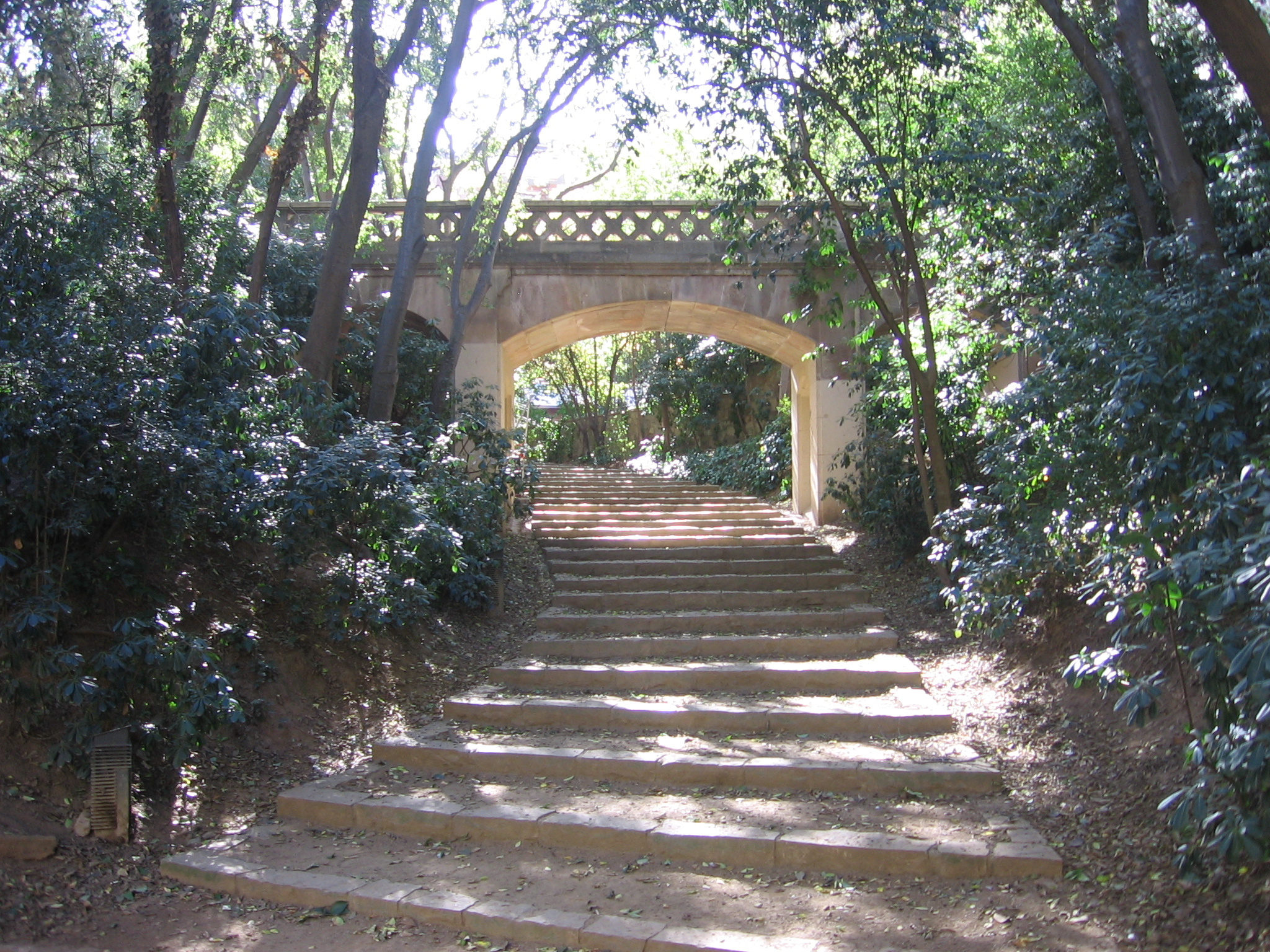 Jardines de Ca n'Altimira.